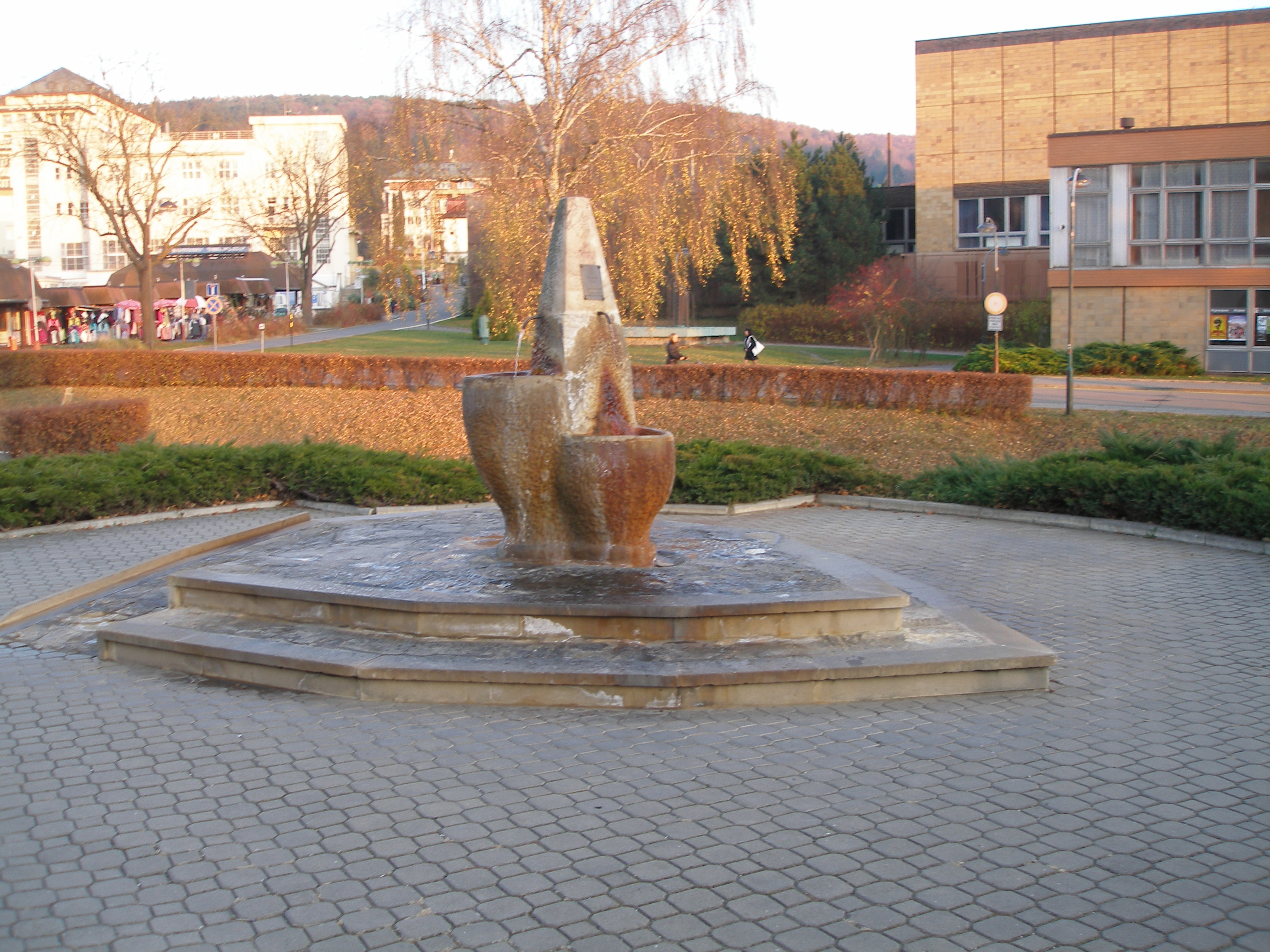 Pramen Svatého Josefa v Luhačovicích vystrojený v roce 2000.